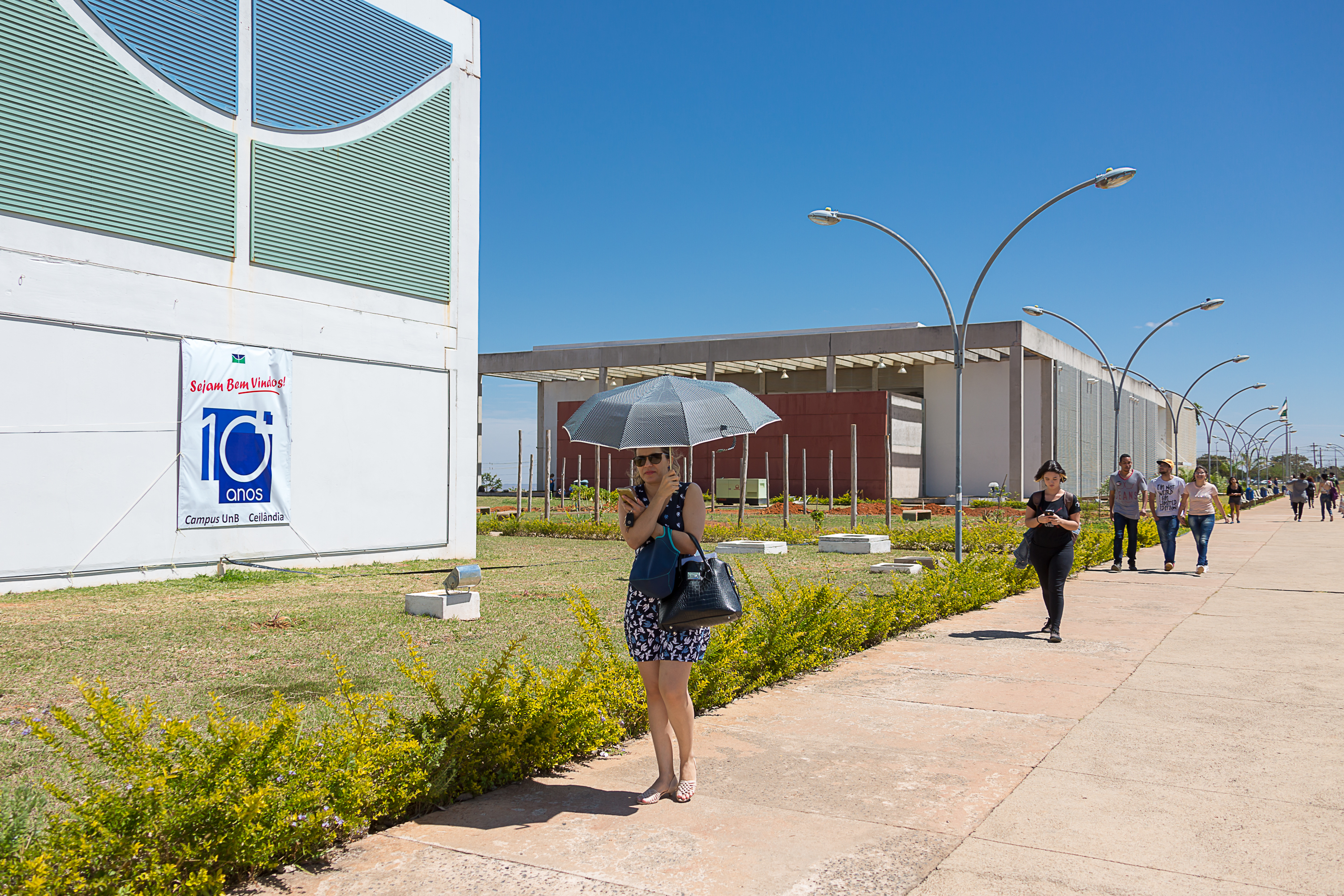 Evento de 10 anos na Faculdade da Ceilandia Foto: Raquel Aviani / Secom UnB. ATENÇÃO – As informações, as fotos e os textos podem ser usados e reproduzidos, integral ou parcialmente, desde que a fonte seja devidamente citada e que não haja alteração de sentido em seus conteúdos. Crédito para textos: nome do repórter/Secom UnB ou Secom UnB. Crédito para fotos: nome do fotógrafo/Secom UnB.